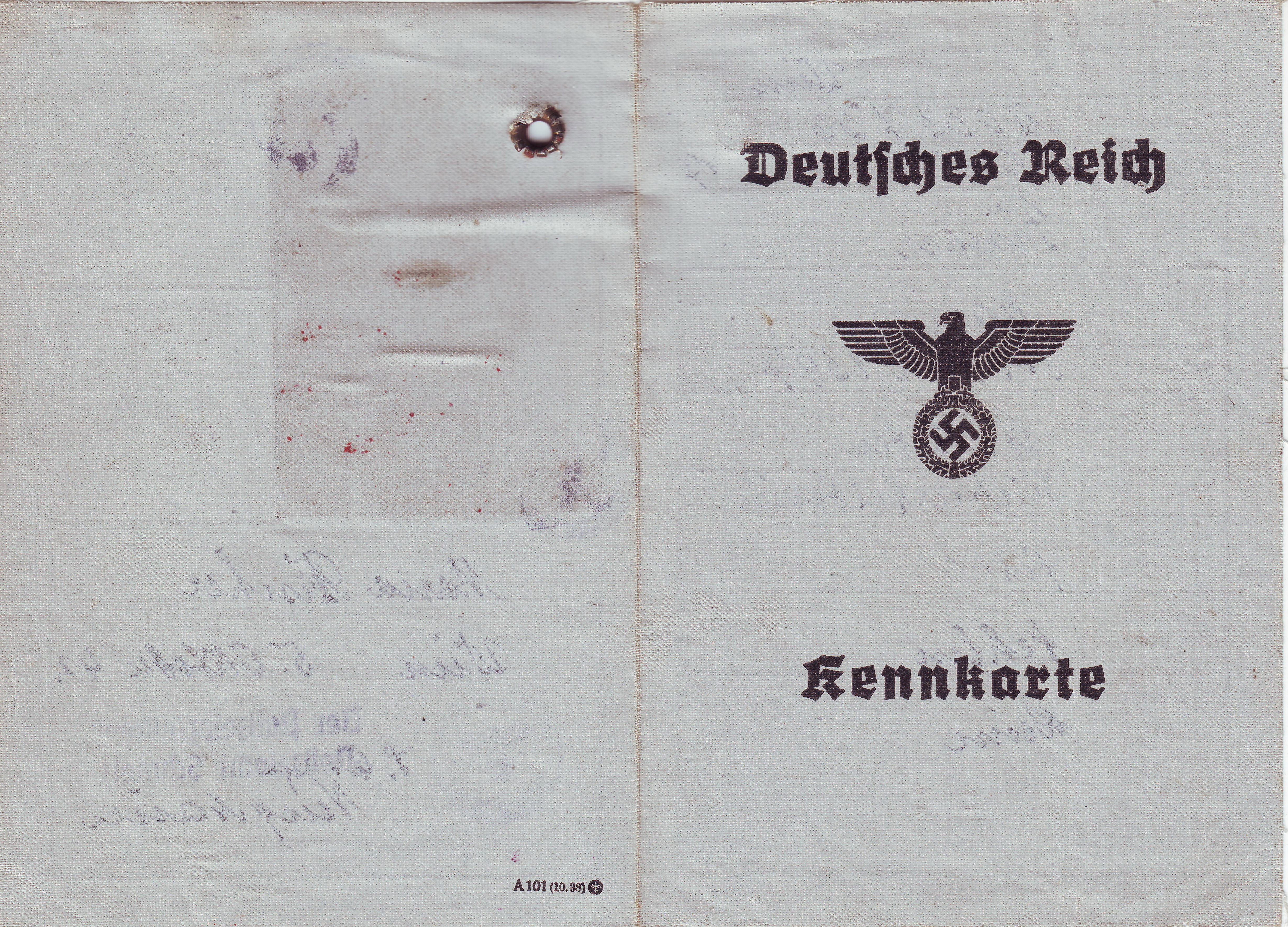 Kennkarte Deutsches Reich, Maria Fischer, 5. Oktober 1942. Das Original dieses Dokumentes befindet sich in Privatbesitz. Die Rechte befinden sich ausschließlich bei Dnalor_01.